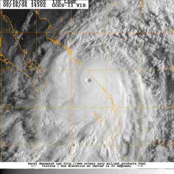 Hurrikan Lane vor der Küste Mexikos